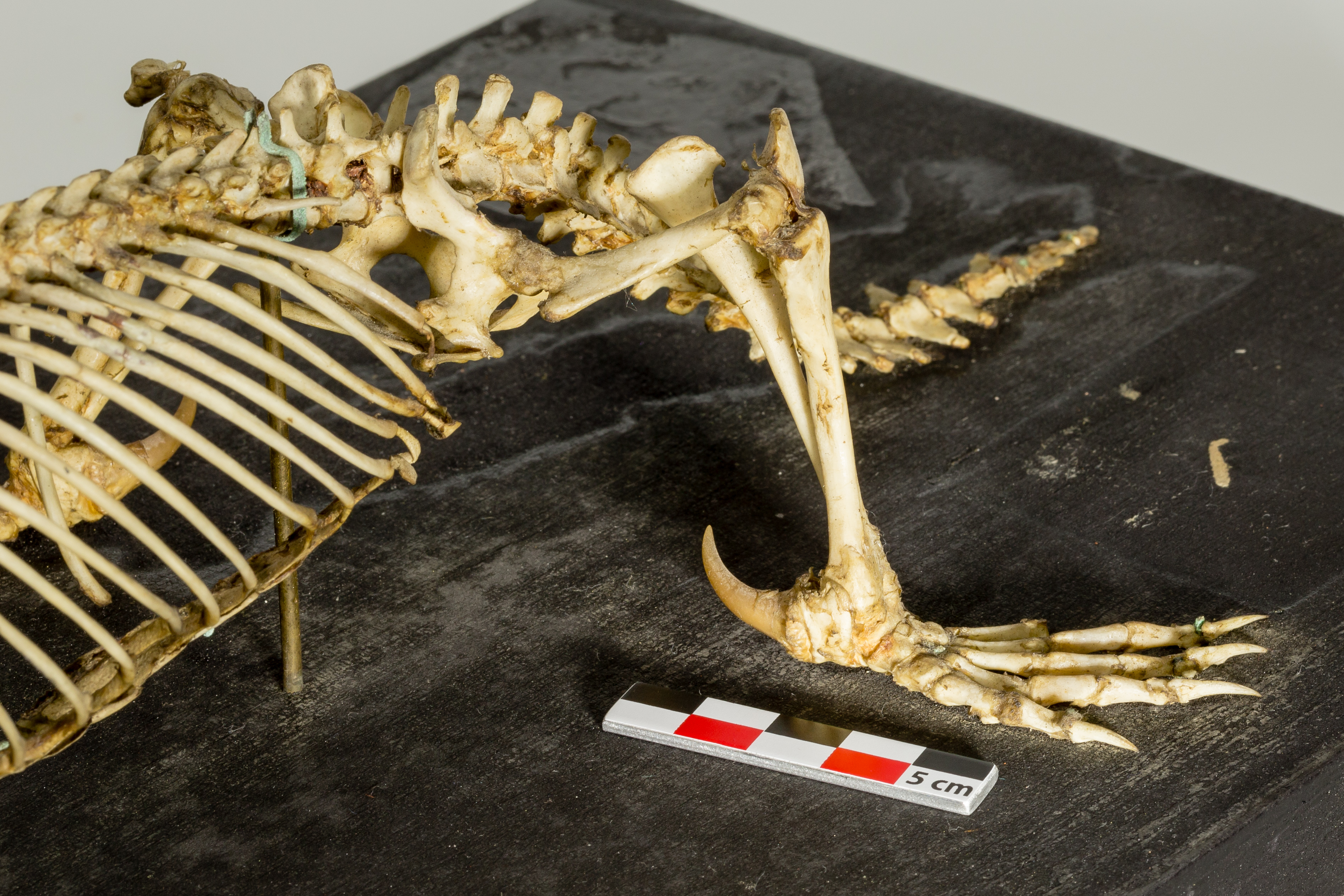 Ornithorynque, squelette, entier, sur socle.